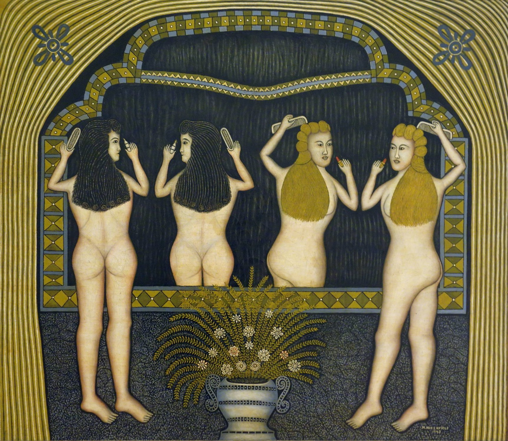 Huile sur toile de Morris Hirshfield intitulée "Two Women in Front of a Mirror" (Deux femmes devant un miroir), faisant partie de la collection Peggy Guggenheim exposée à Venise